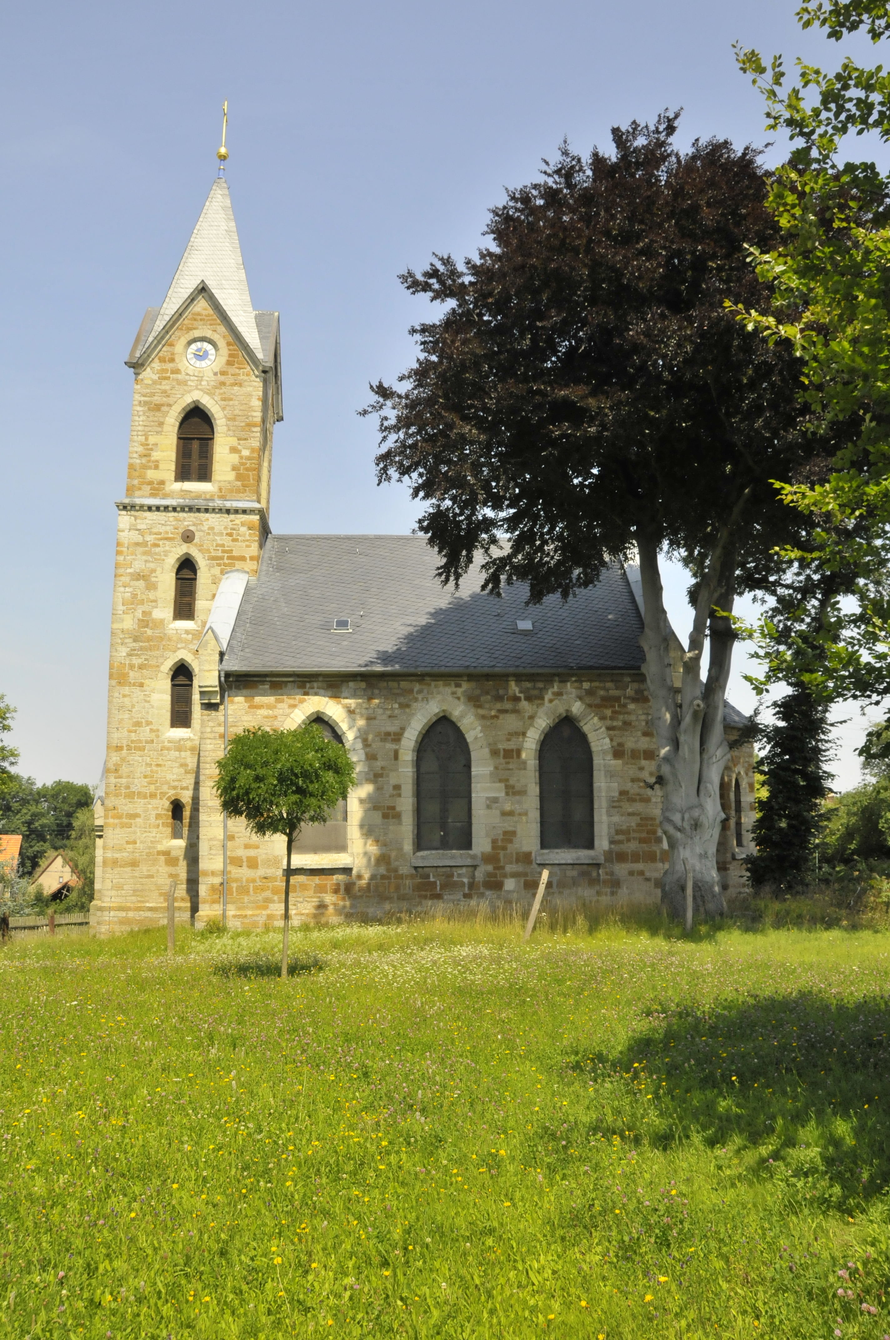 Wenigenehrlich, Kirche